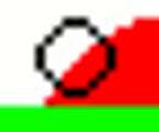 Voorbeeld met vergroten, eigen werk.